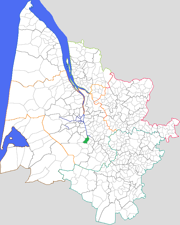 Positionnement Saint Médard d'eyrans Gironde, France